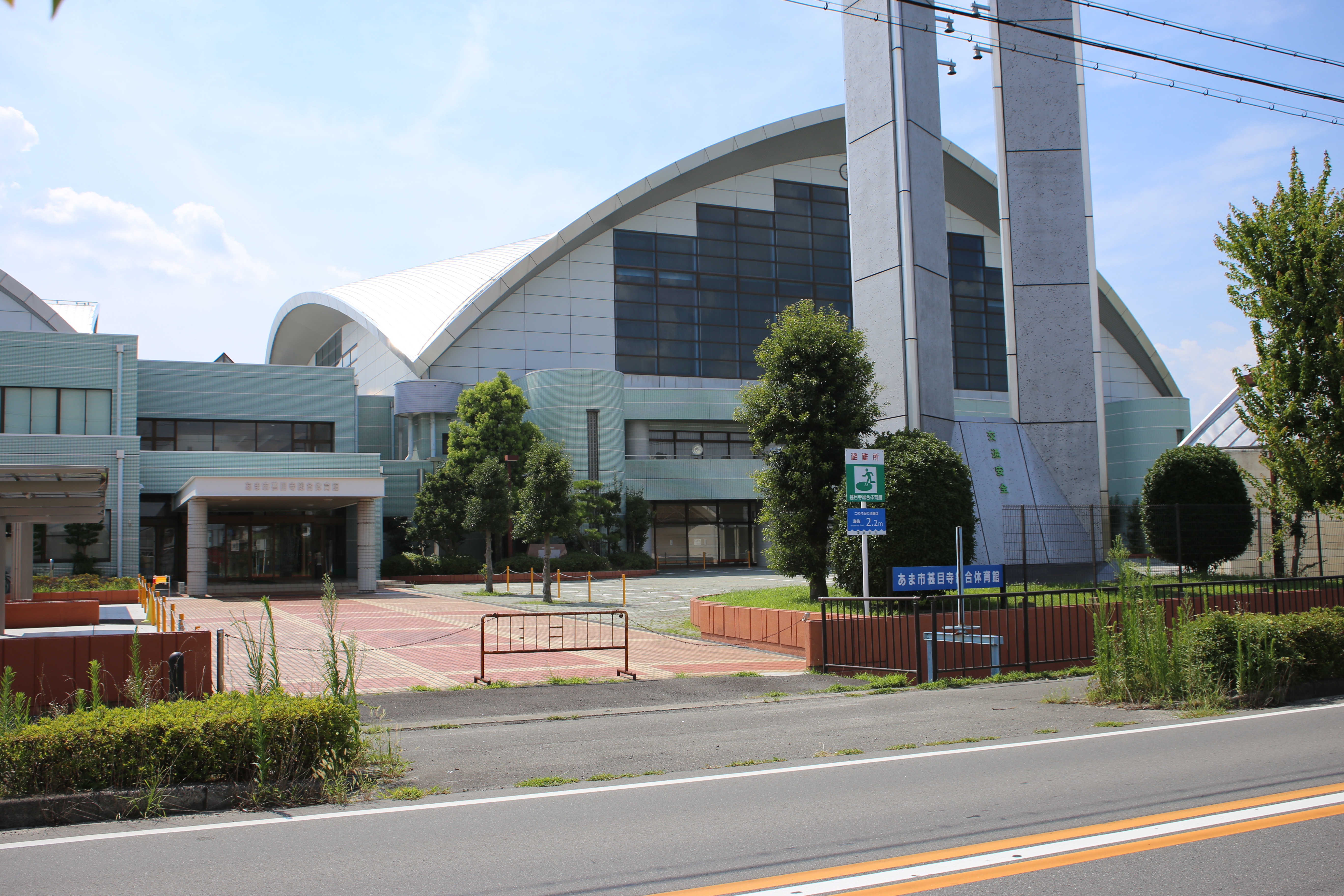 愛知県あま市西今宿馬洗のあま市甚目寺総合体育館を東側公道南側より撮影